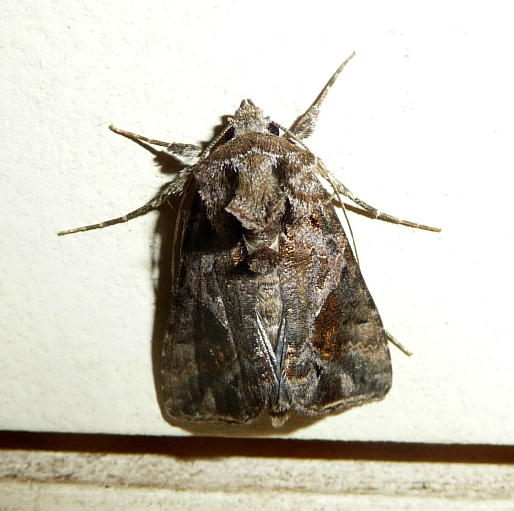 Ctenoplusia accentifera.? Noctuidae Plusiinae Argyrogrammatini